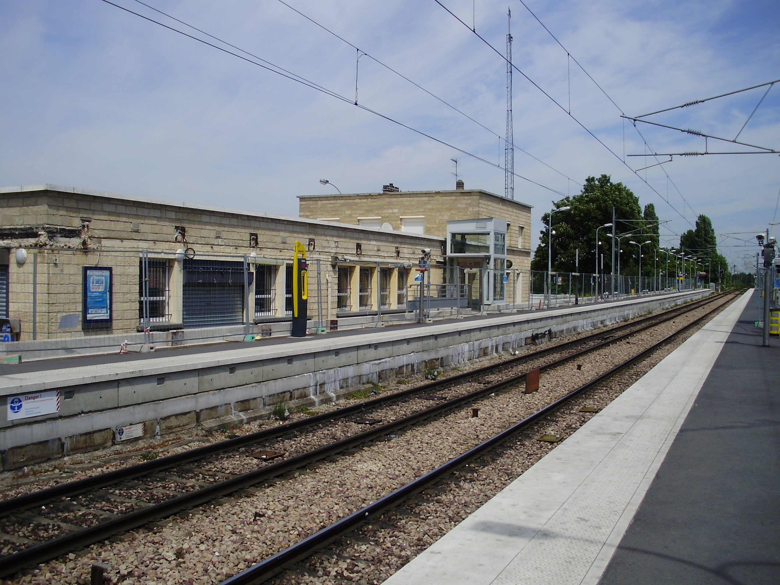 Gare de Villeparisis - Mitry-le-Neuf, à Mitry-Mory, Seine-et-Marne, France : vue du bâtiment voyageurs, des quais et des voies depuis l'extrémité ouest du quai de la voie 2B pour Paris et au-delà (les voies au premier plan servent surtout aux trains de la ligne B du RER)